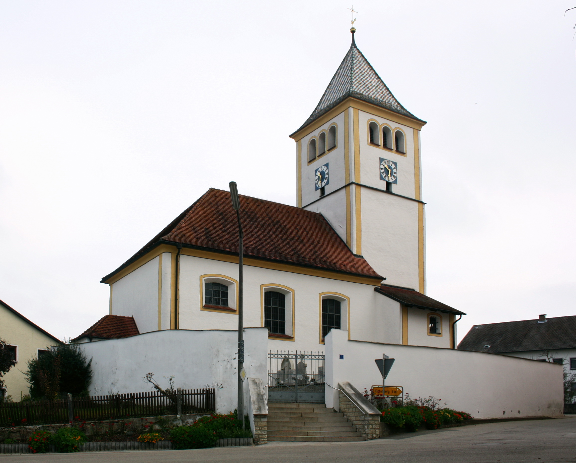 Kirche St. Johannes Babtist in Pfahldorf bei Eichstätt.